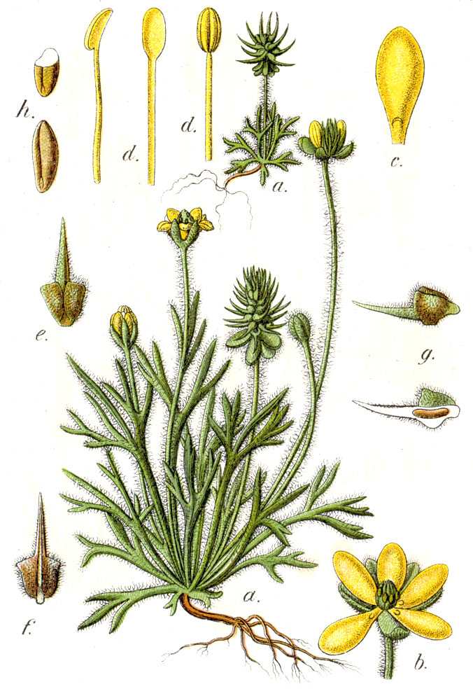 Ranunculus testiculatus Crantz (1763), syn. Ceratocephala testiculata (Crantz) Roth (1827) Original Caption Geradhorn, Ranunculus testiculatus